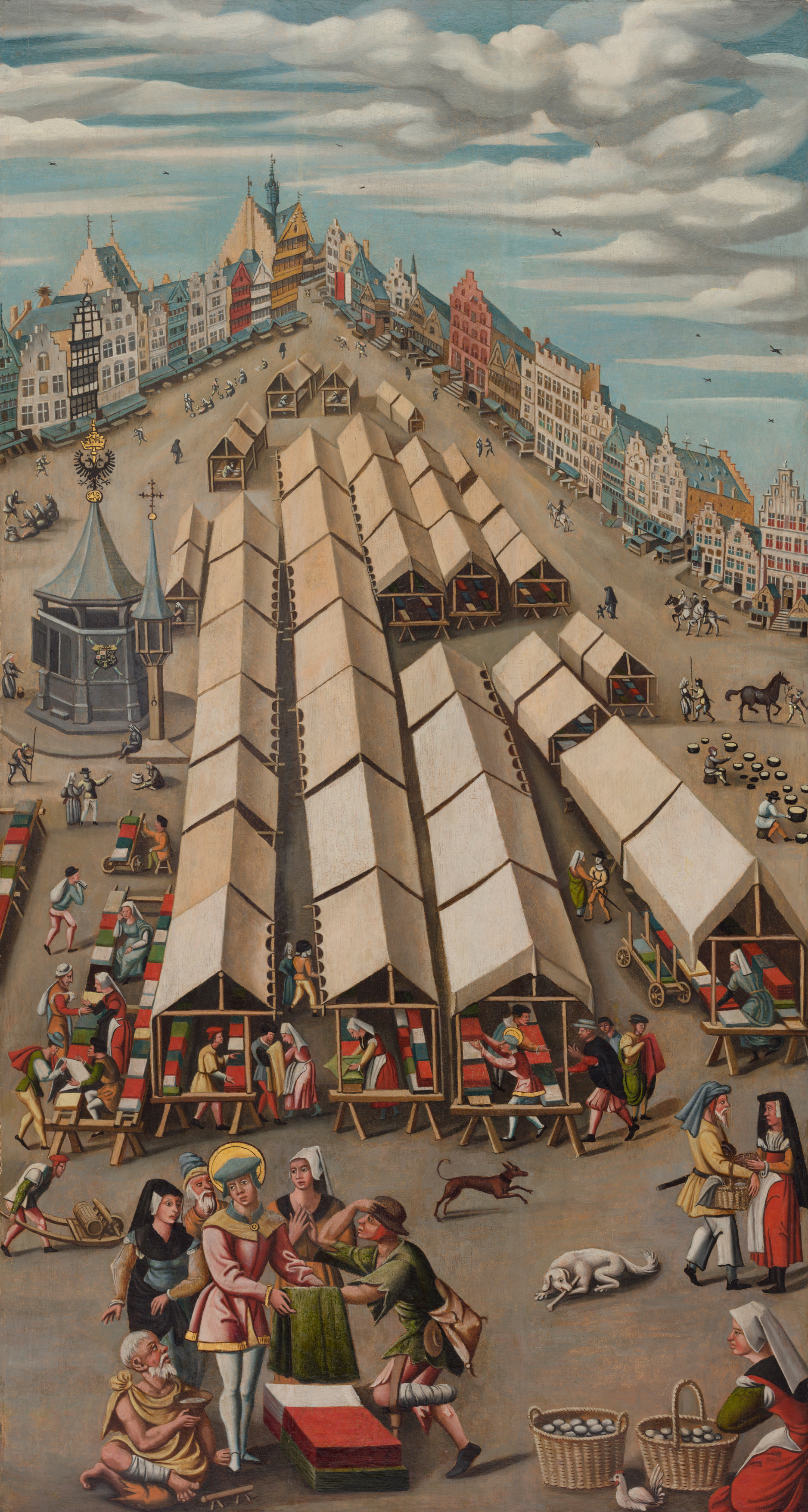 De Markt te 's-Hertogenbosch gezien vanaf de Korte Kerkstraat naar de Hoge Steenweg. Op de voorgrond Sint-Franciscus, de patroonheilige van het gewandsnijders- en droogscheerdersgilde, die stoffen uitdeelt aan de armen.